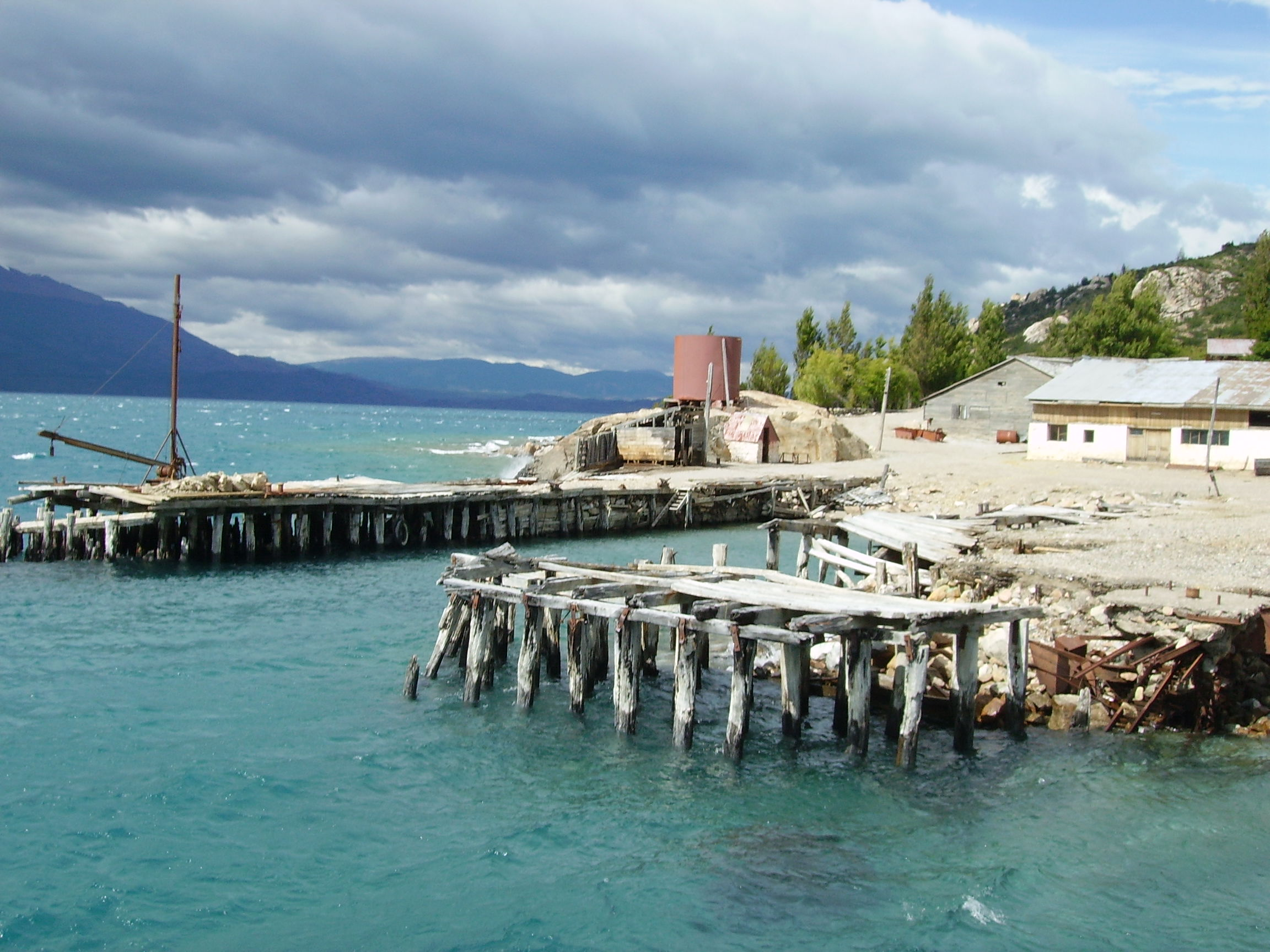 Campamento minero Puerto Cristal This is a photo of a national monument in Chile: 2035